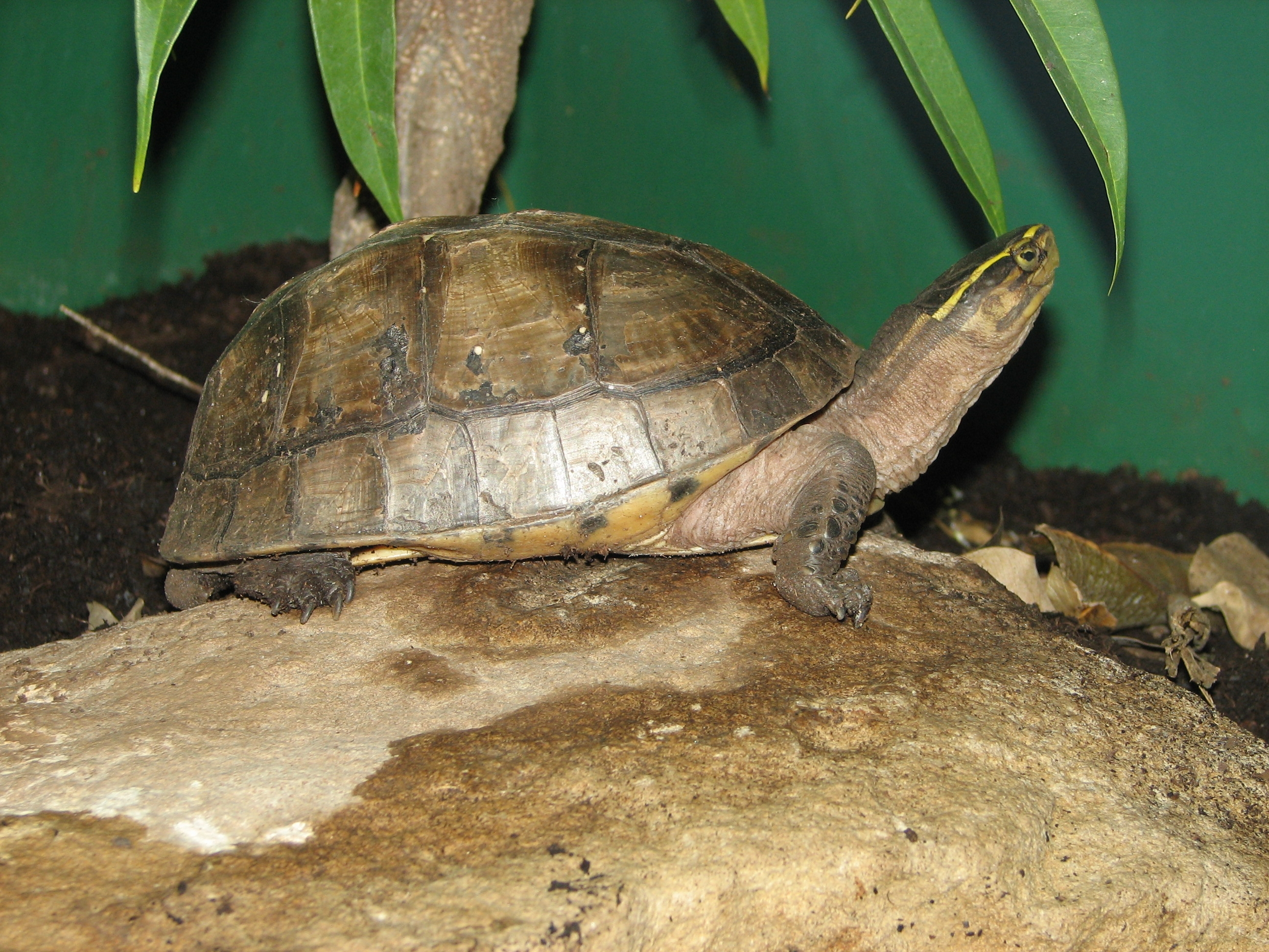 Asian Box Turtle - Cuora amboinensis amboinensis